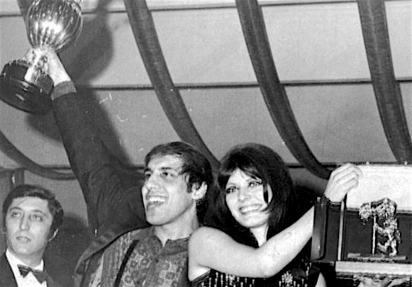 Adriano Celentano e Claudia Mori vincitori del Festival di Sanremo 1970